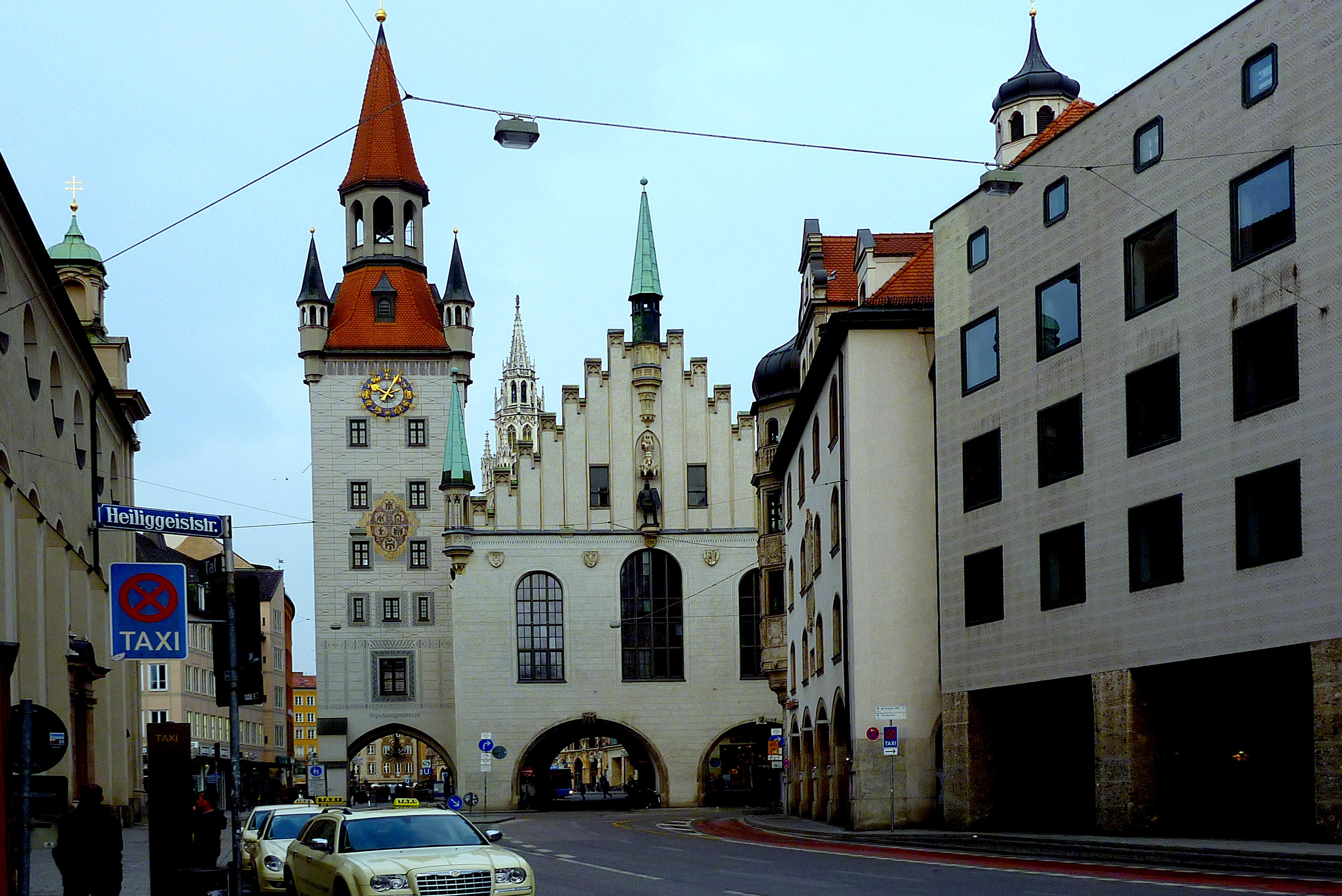 München, régi városháza (Altes Rathaus)